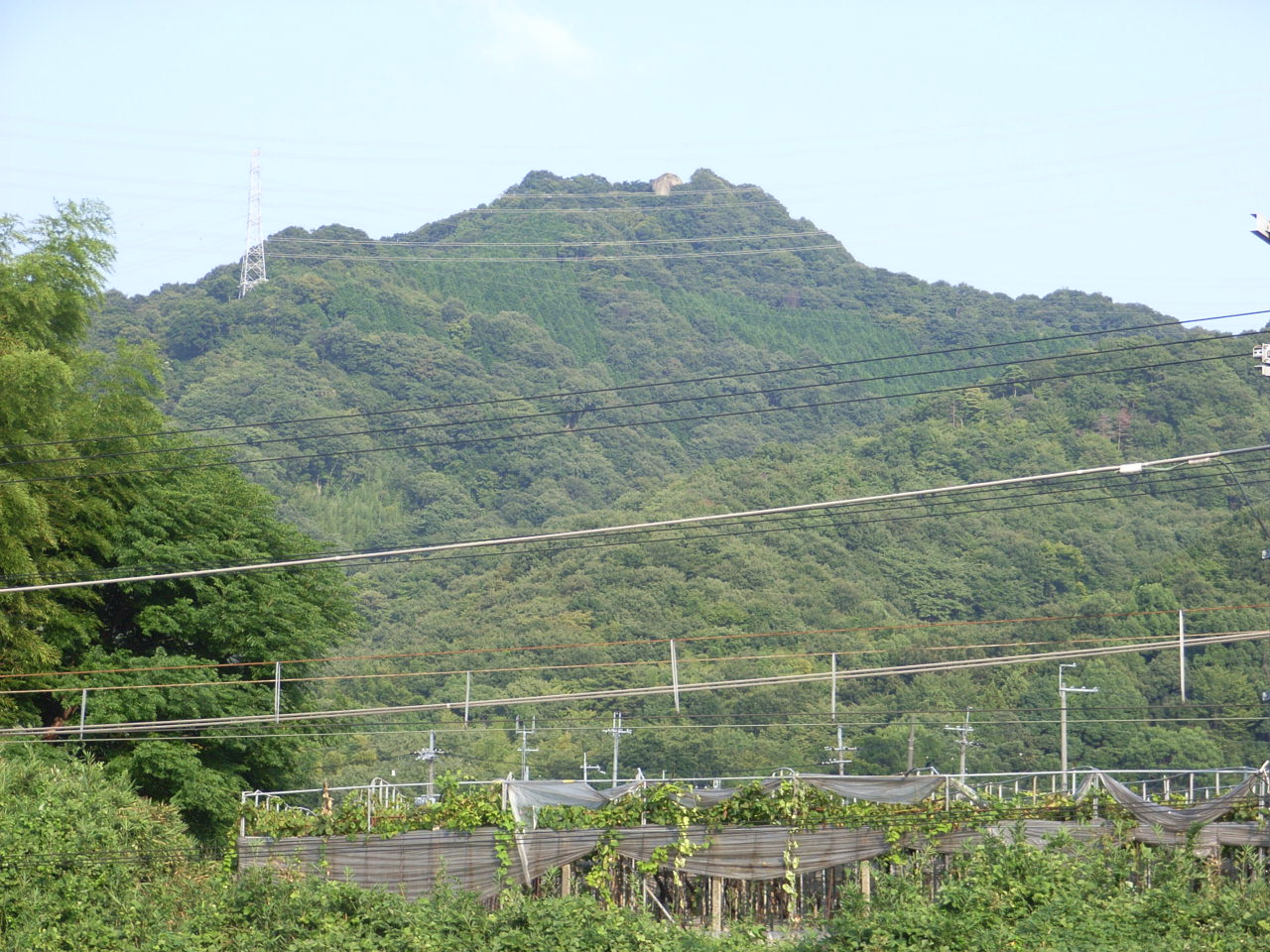 交野山